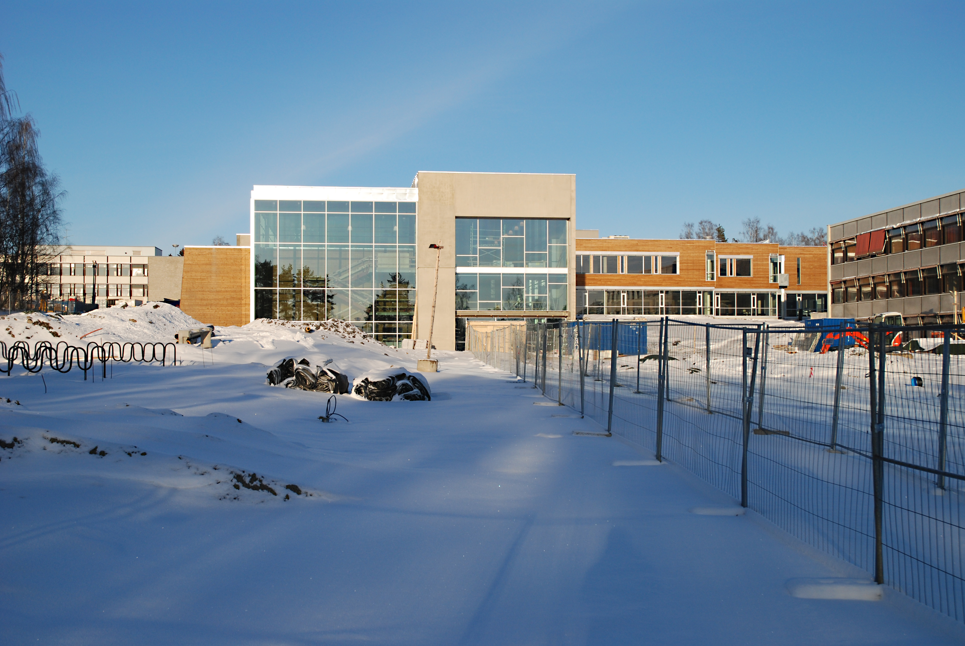 Hamar katedralskole, in Hamar, Hedmark, Norway.